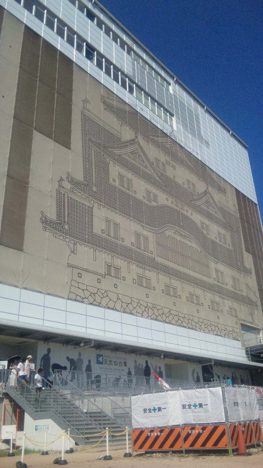 姫路城「平成の修理・天空の白鷺」